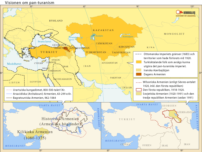 Visionen om panturanism och dess effekt på den armeniska nationen